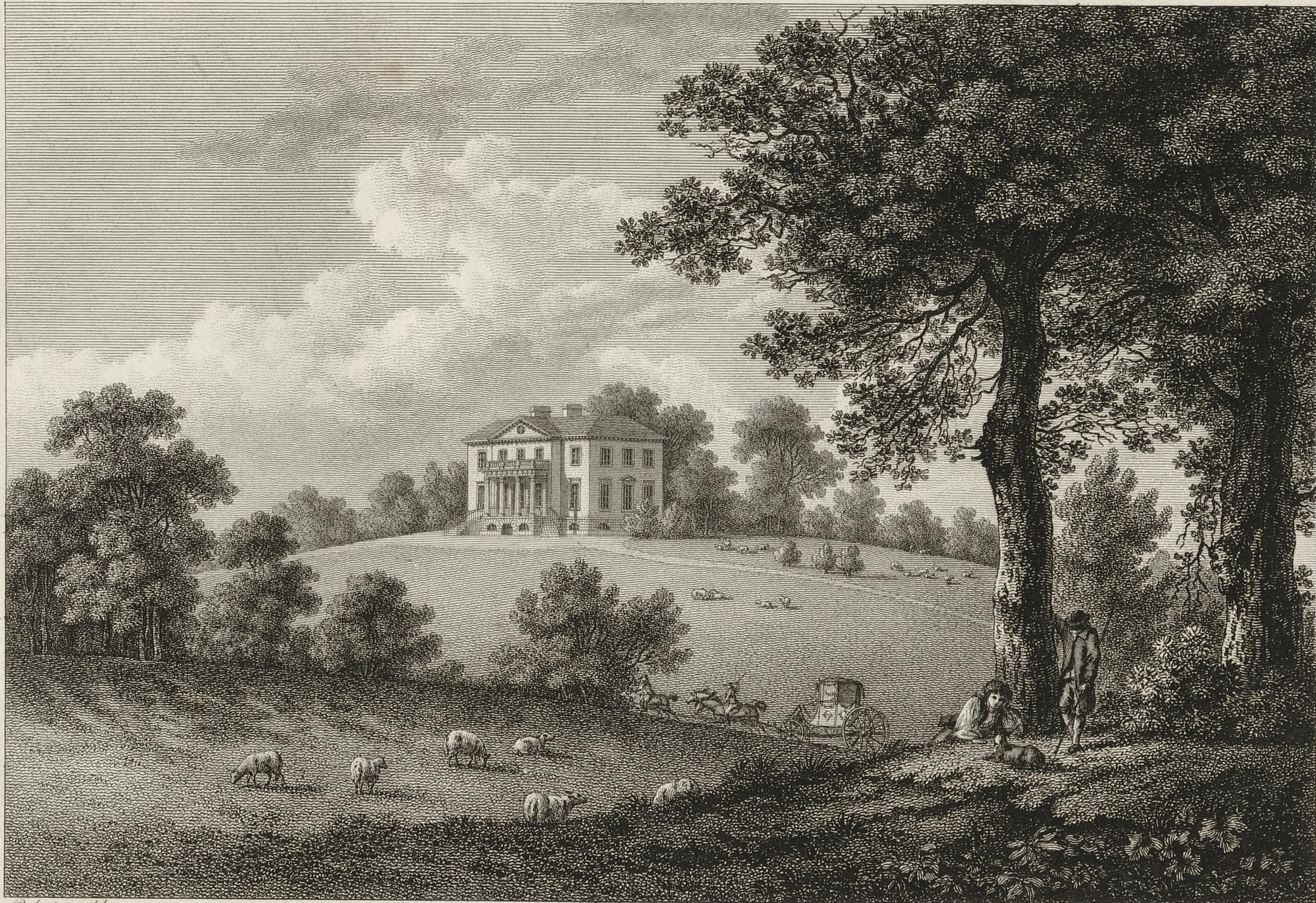 Illustrasjon hentet fra boken "seats of the nobility and gentry" av Watts, William og utgitt av Published by W. WattsChelsea : Published by W. Watts, 1779 (Chelsea, 1779)